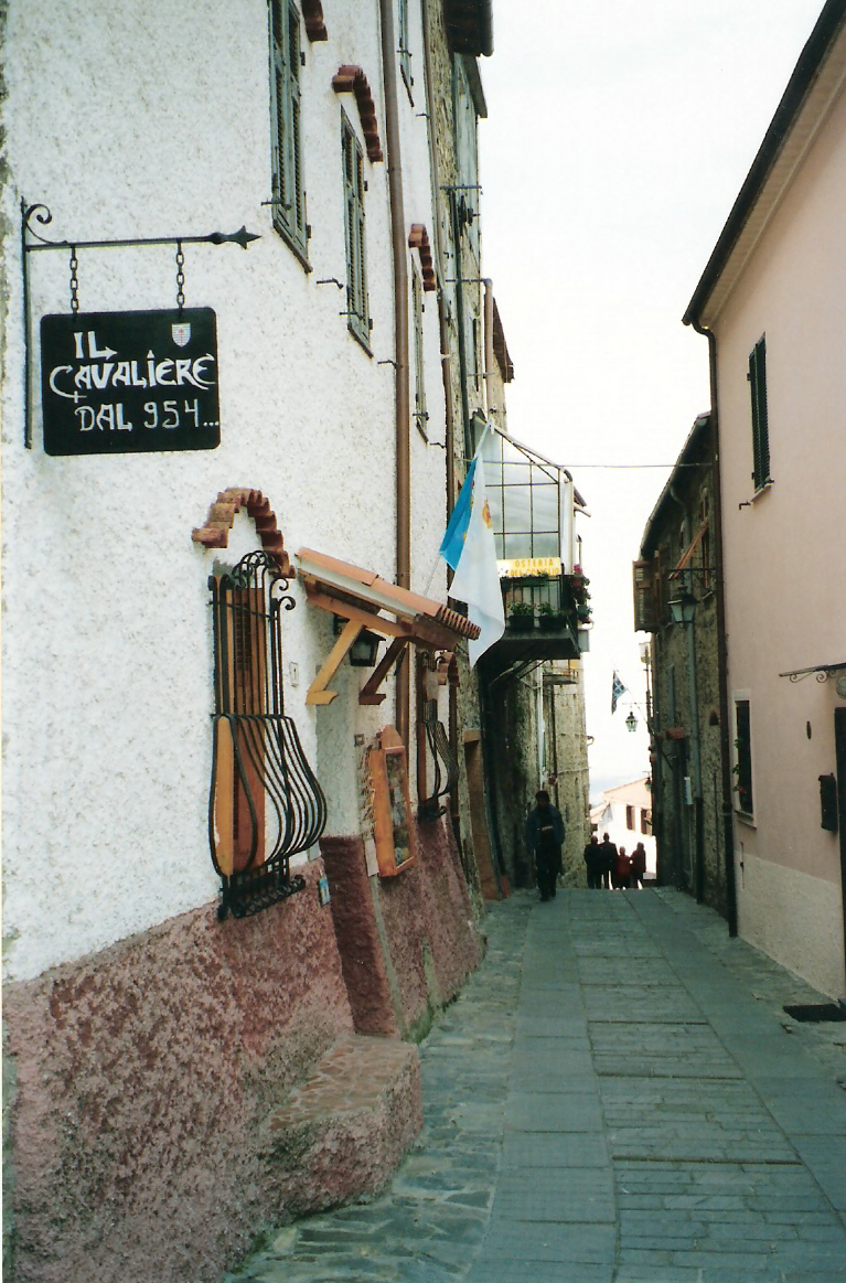 Scorcio del borgo di Seborga